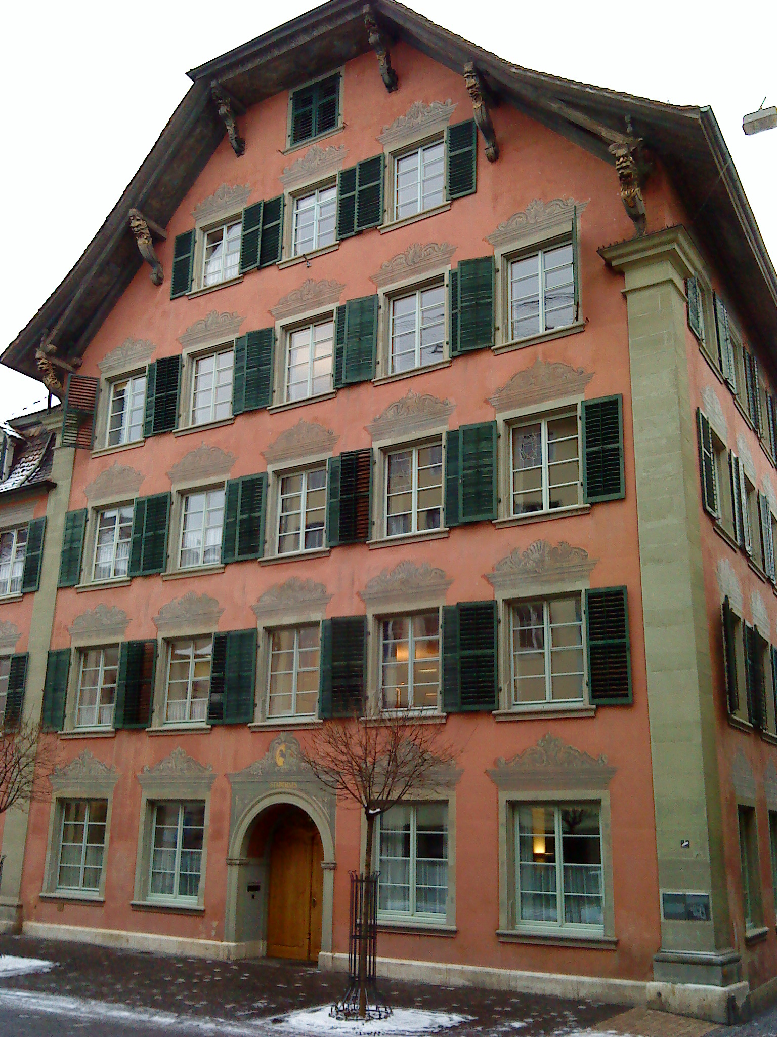 Stadthaus von Schaffhausen/Schweiz. Sitz des Stadtrats (Exekutive) von Schaffhausen.